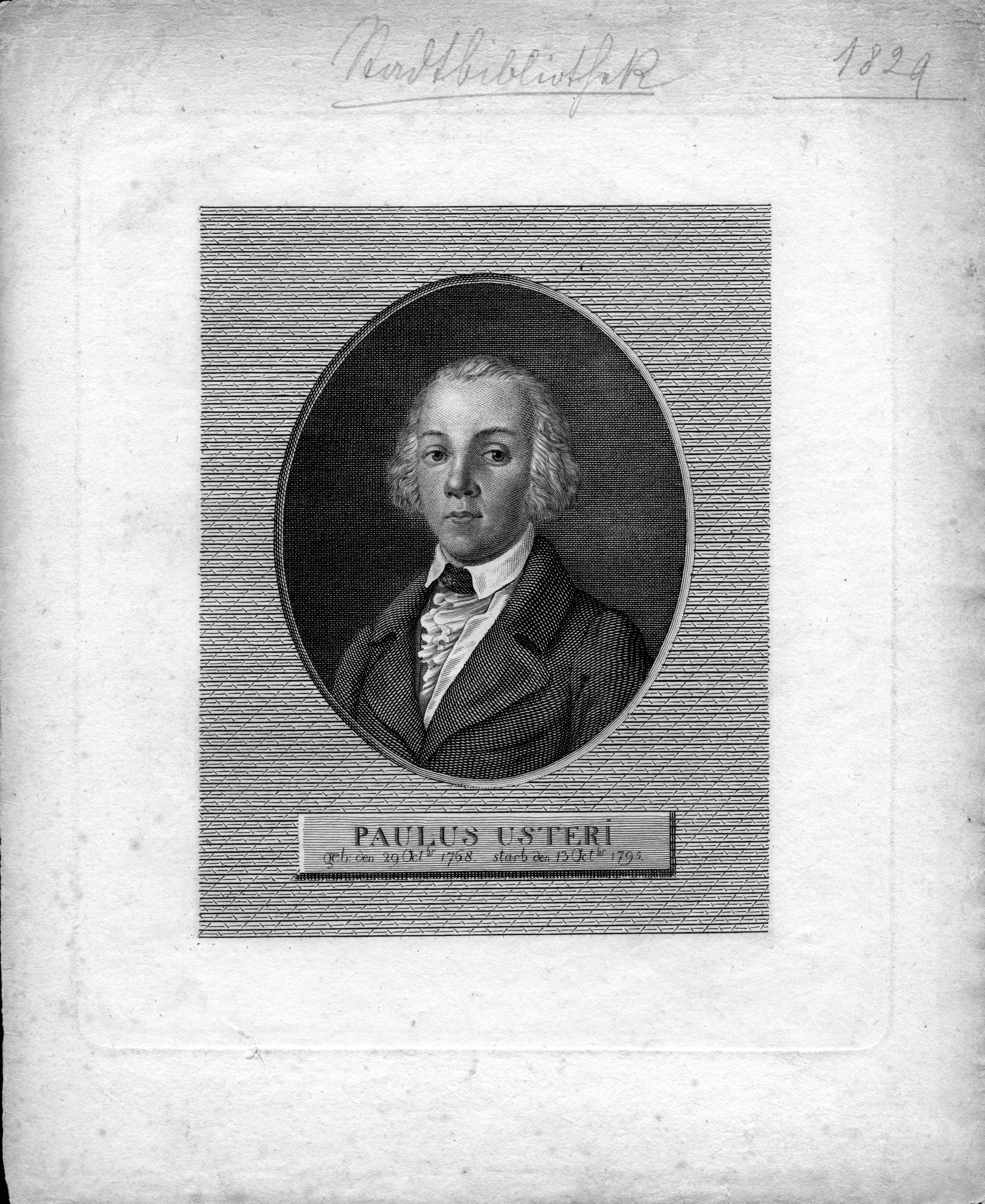 portrait gravé